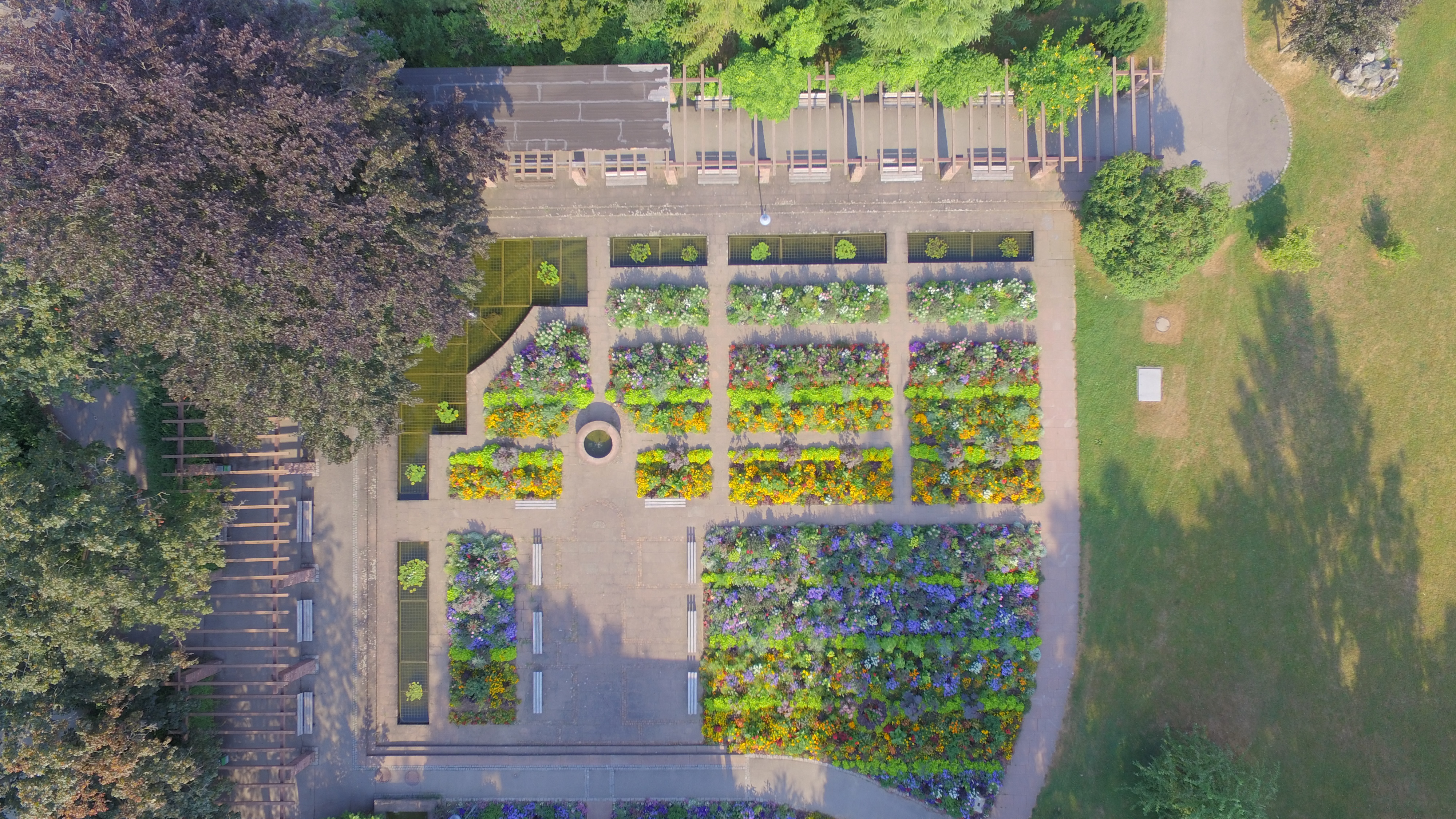 Zeigt die wunderschön angelegten Blumenbeete senkrecht von oben